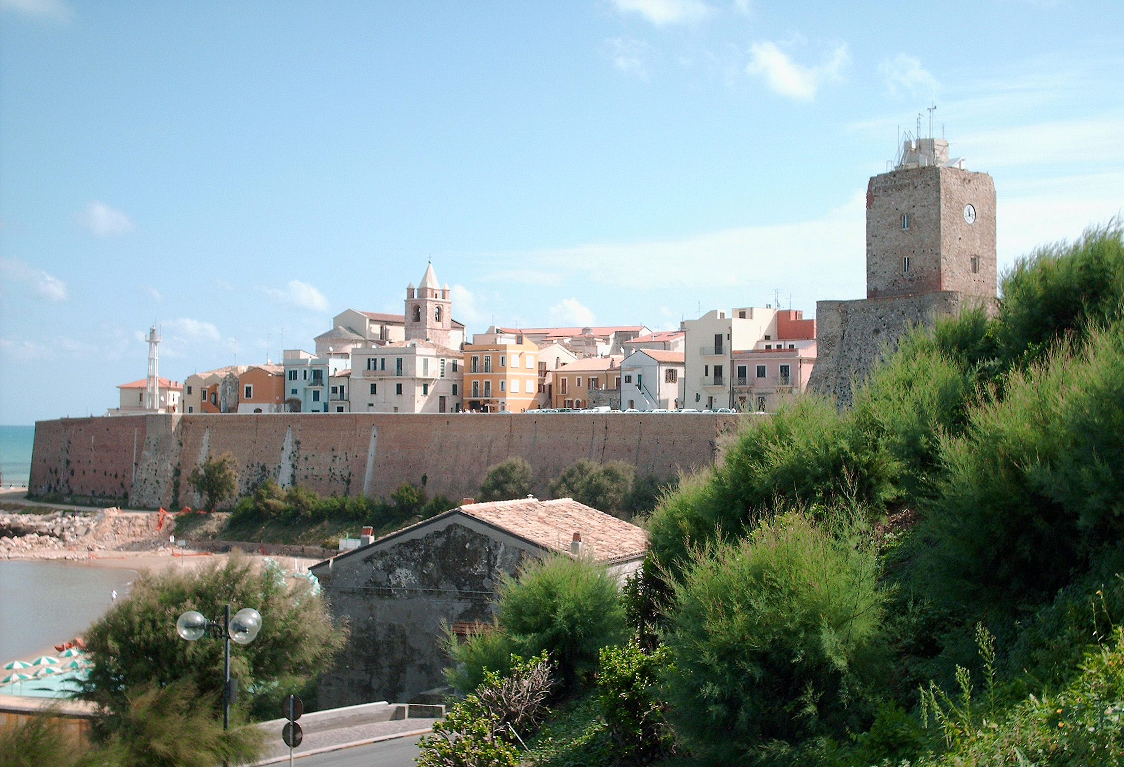 Borgo antico di Termoli visto dal mare